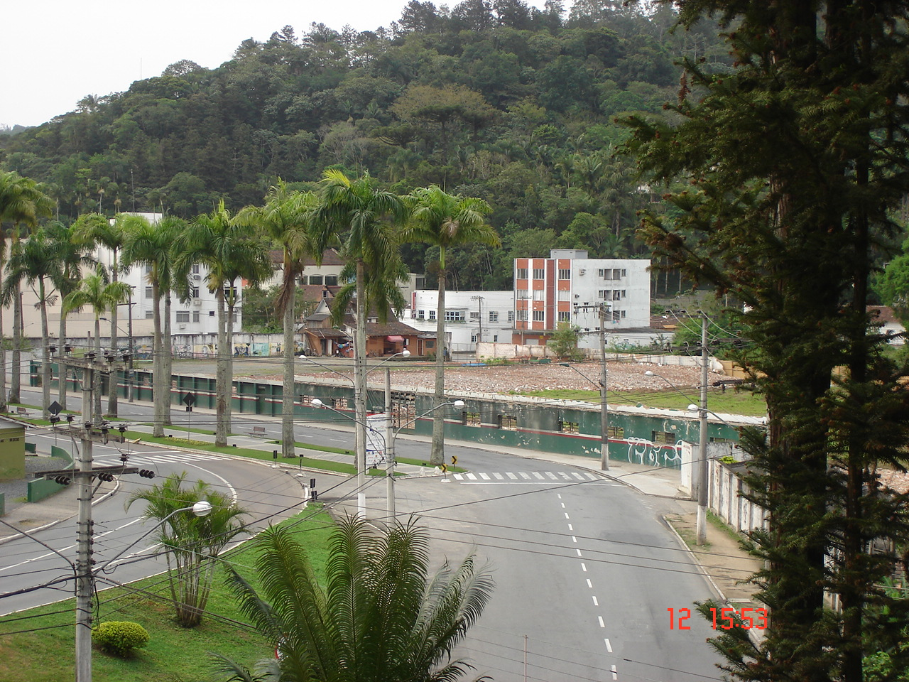 Foto do Estádio Aderbal Ramos da Silva, pós-demolição.